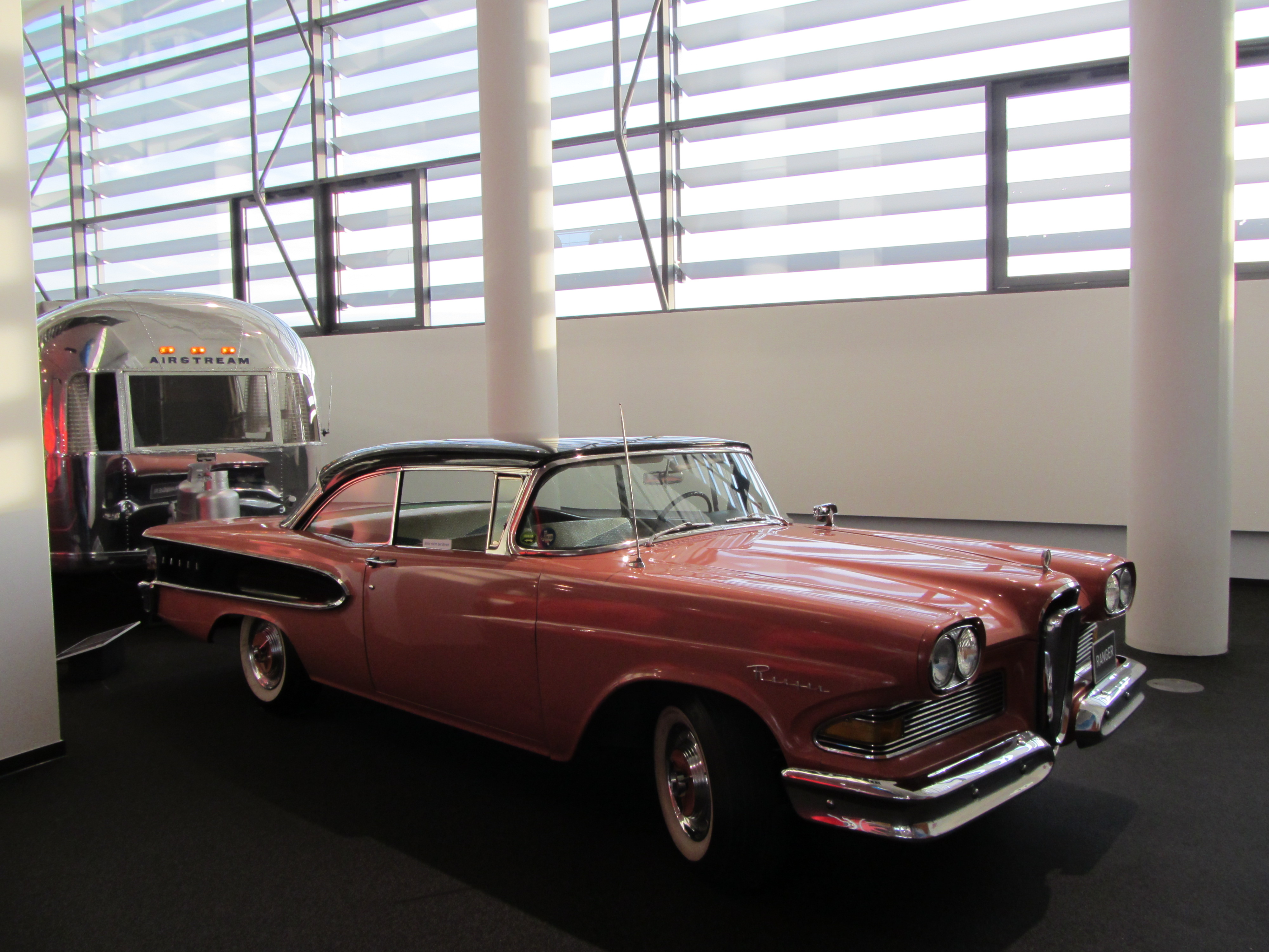 1958 Edsel Ranger 2-Door Hardtop